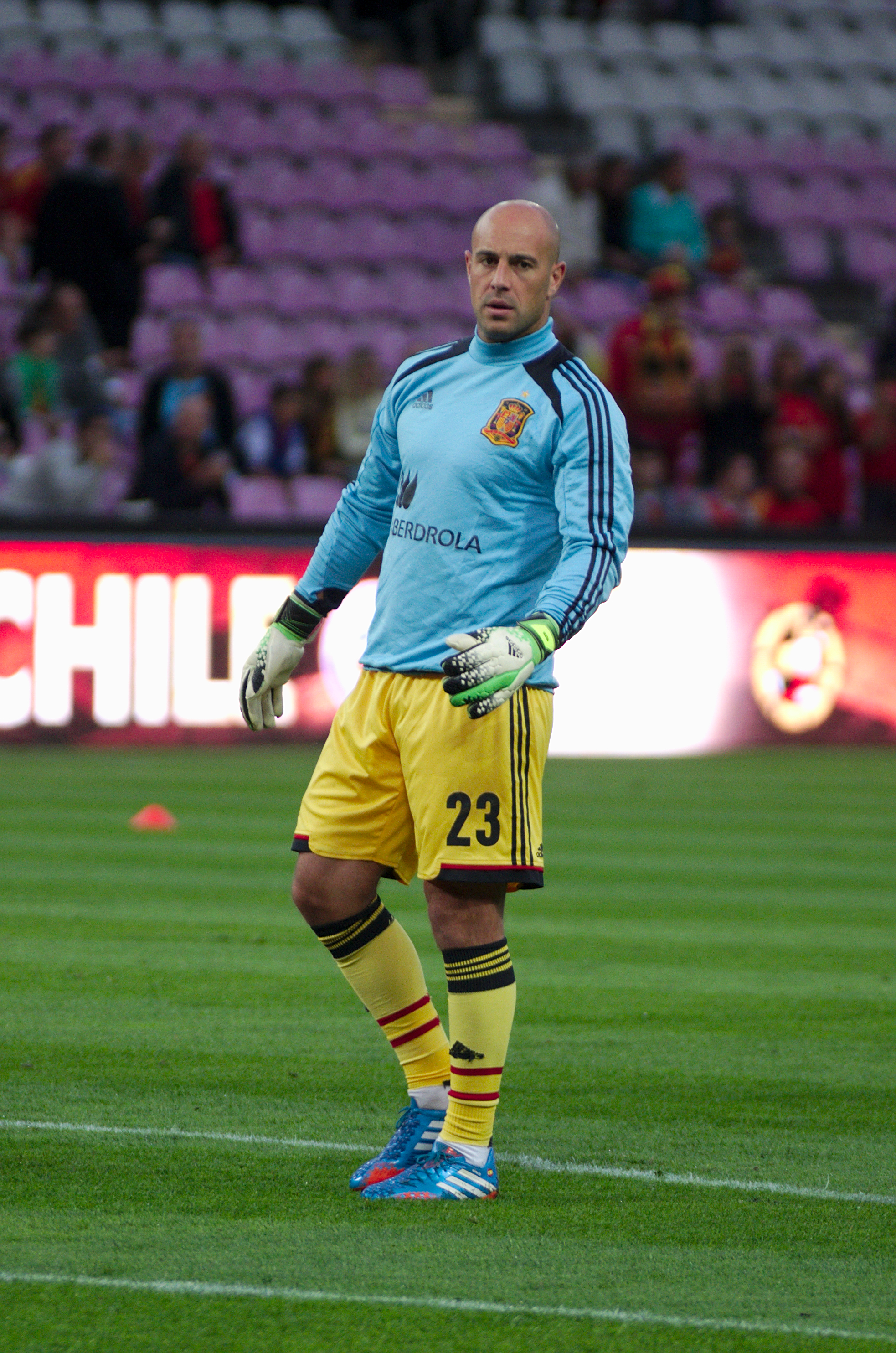 Spain - Chile - 10-09-2013 - Geneva - José Manuel Reina